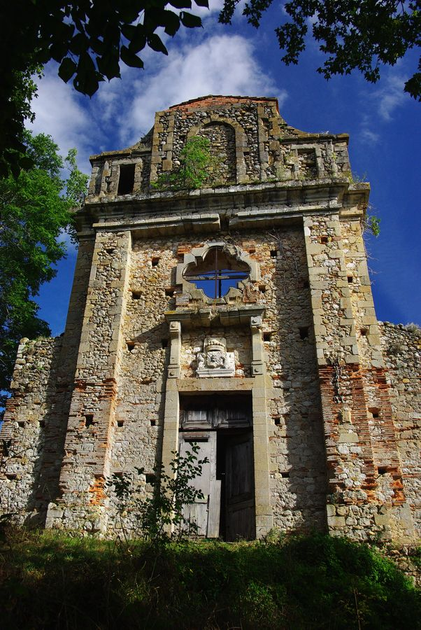 Château de Pailhès (Inscrit) .